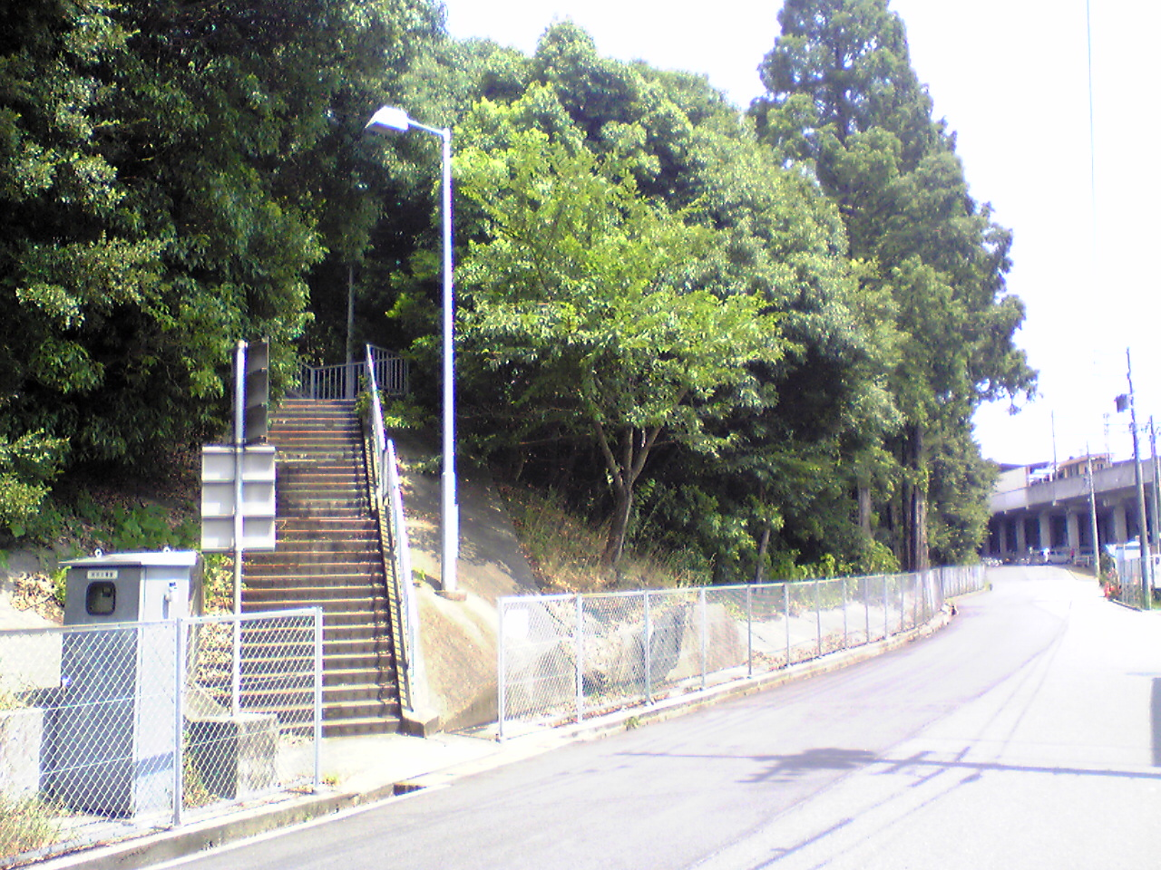 東名本宿バスストップの下り線階段。後方に名鉄名古屋本線本宿駅を望む。